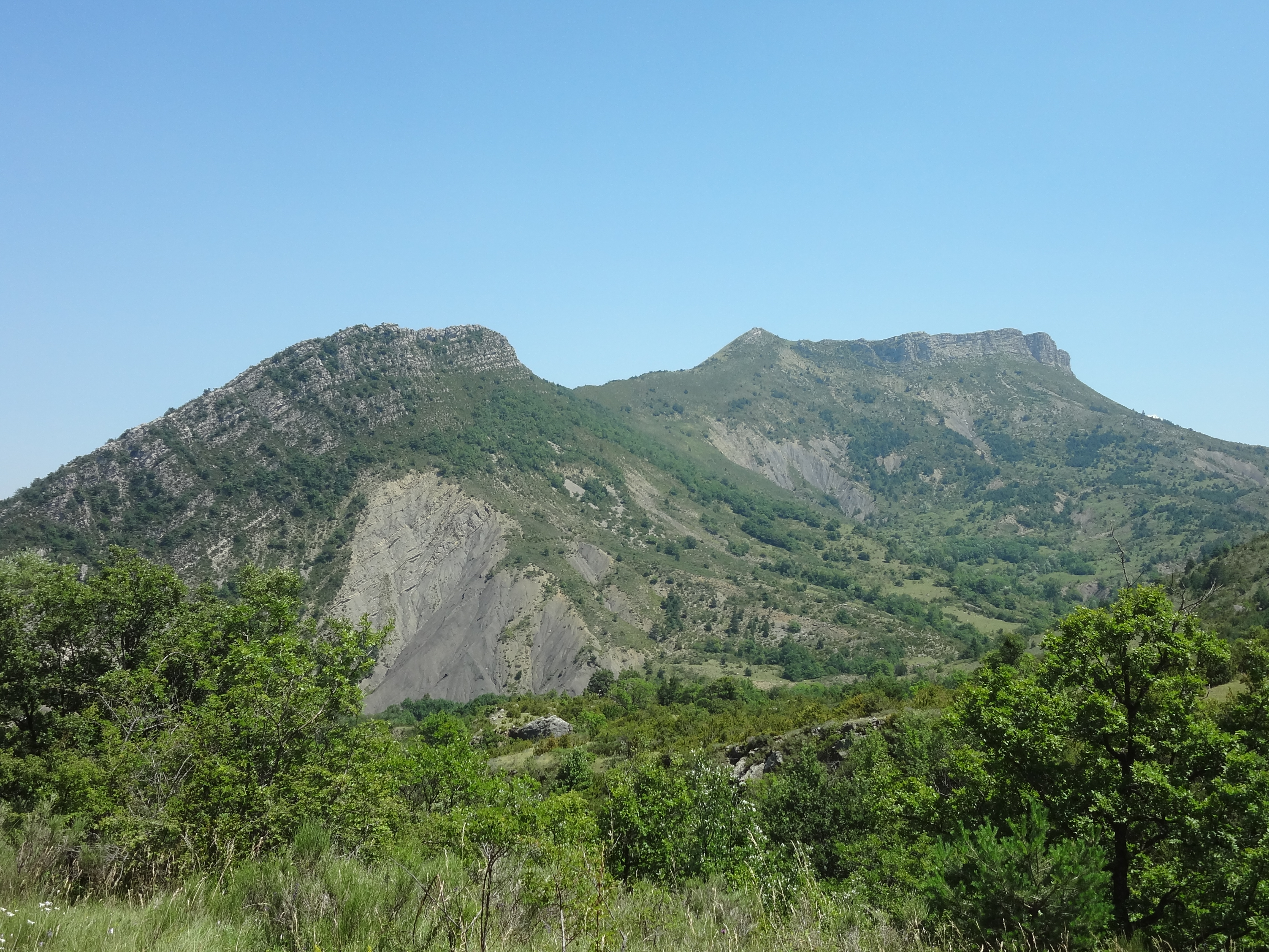 Téléchargée avec Commonist 0.9.1 Vallon de La Melle : la barre appartient à la montagne de Vibres, qui culmine à 1693 m (partie de droite) ; la partie de gauche a un sommet à 1471 m